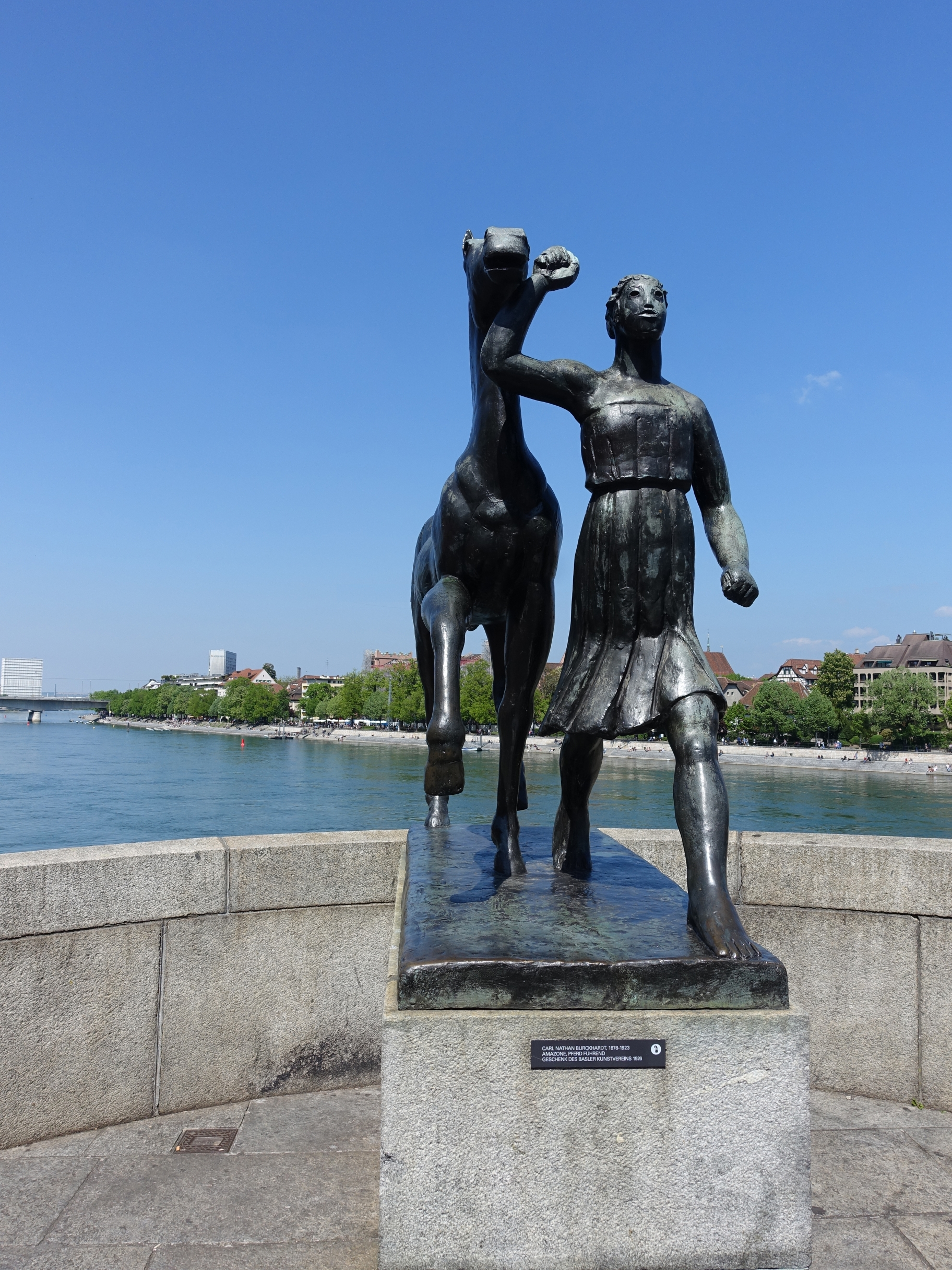 Carl Burckhardt (1878–1923), auch Carl Nathan Burckhardt genannt. Skulptur. Amazone, Pferd führend. Geschenk des Basler Kunstvereins, 1926, Standort, Schifflände, Basel